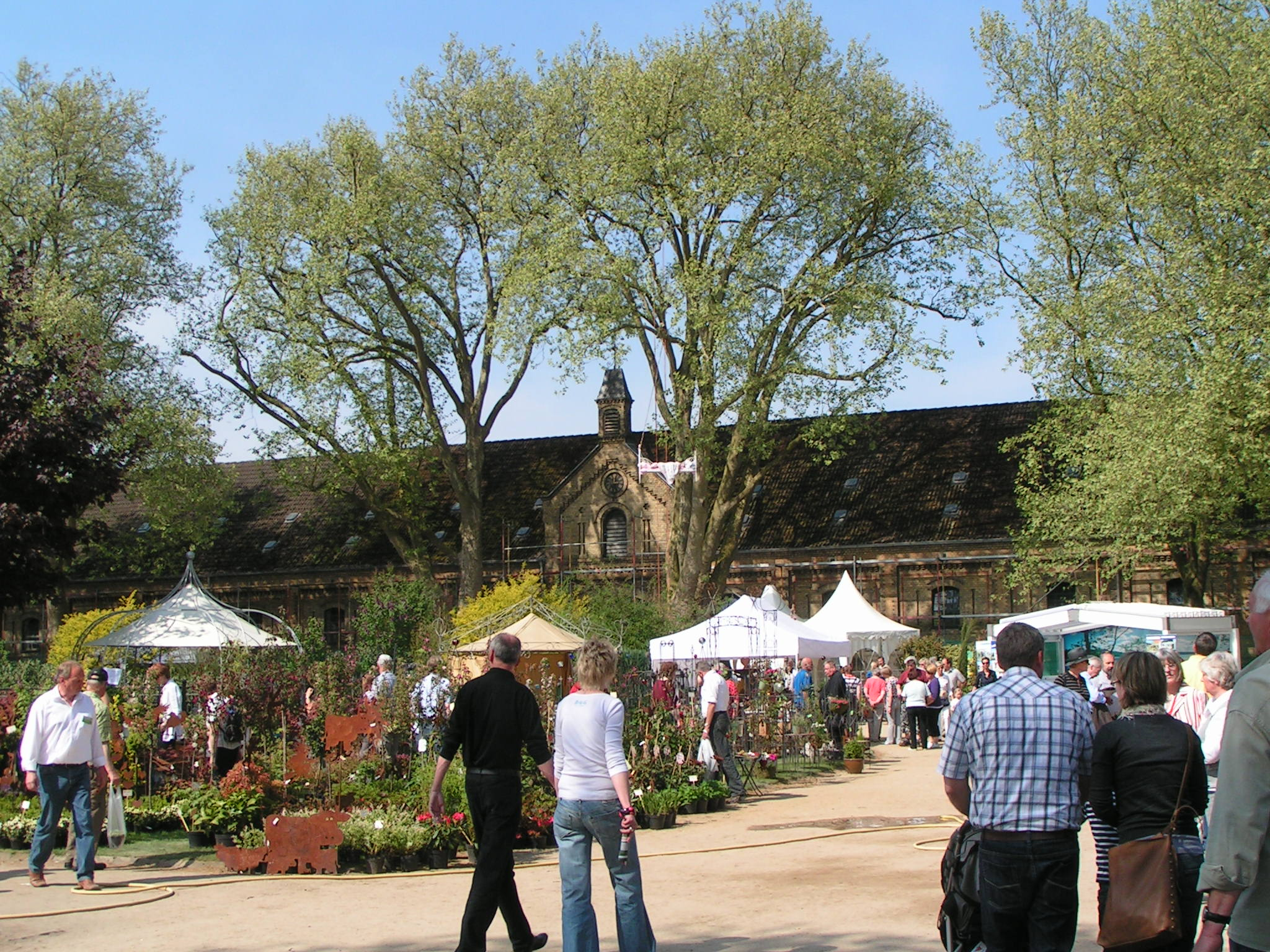 Gartenfestival 2009 auf dem Gelände des Landesgestüts Warendorf